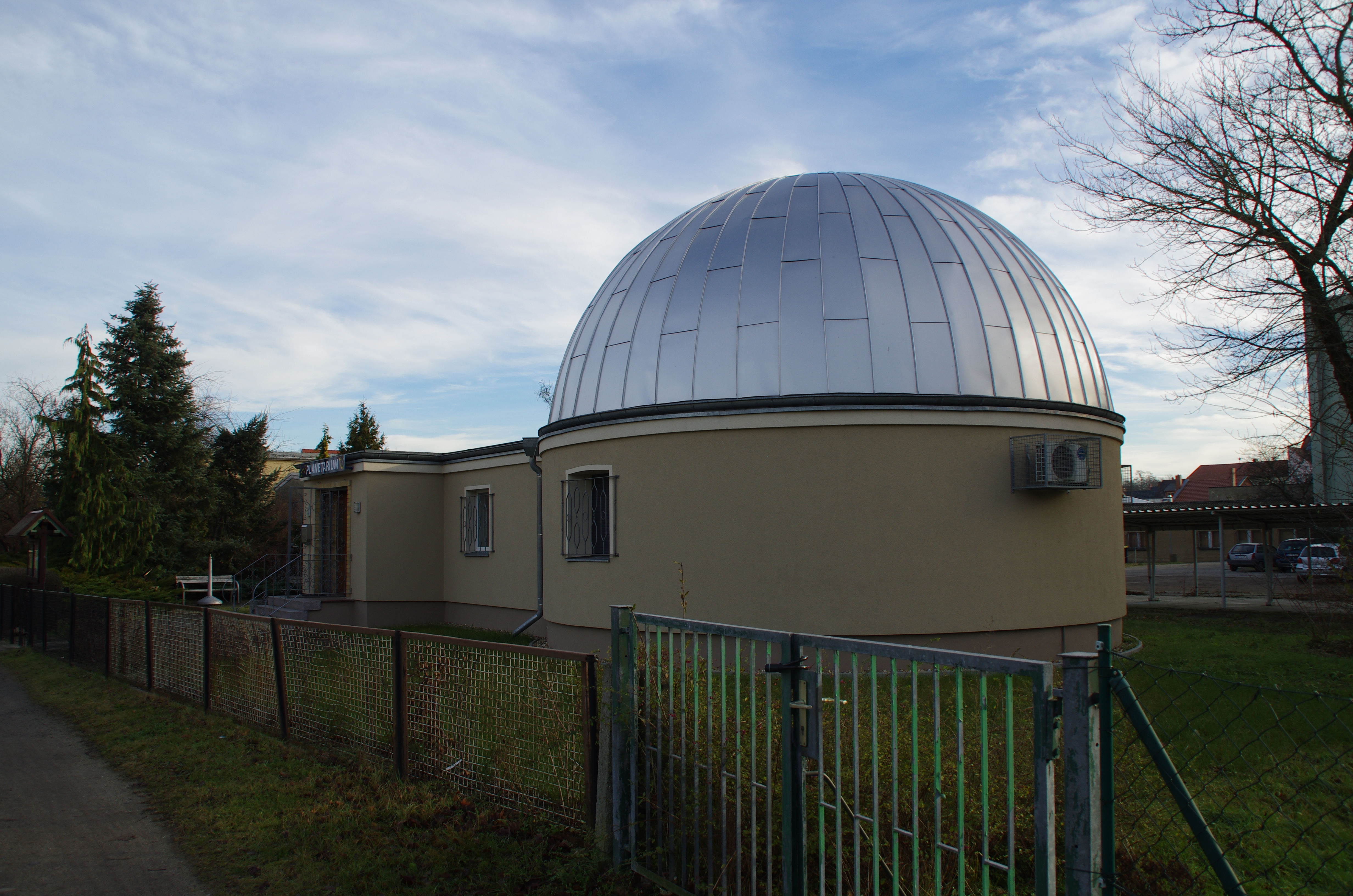 Herzberg Elster in Brandenburg. Das Haus wie im Namen beschrieben steht unter Denkmalschutz.